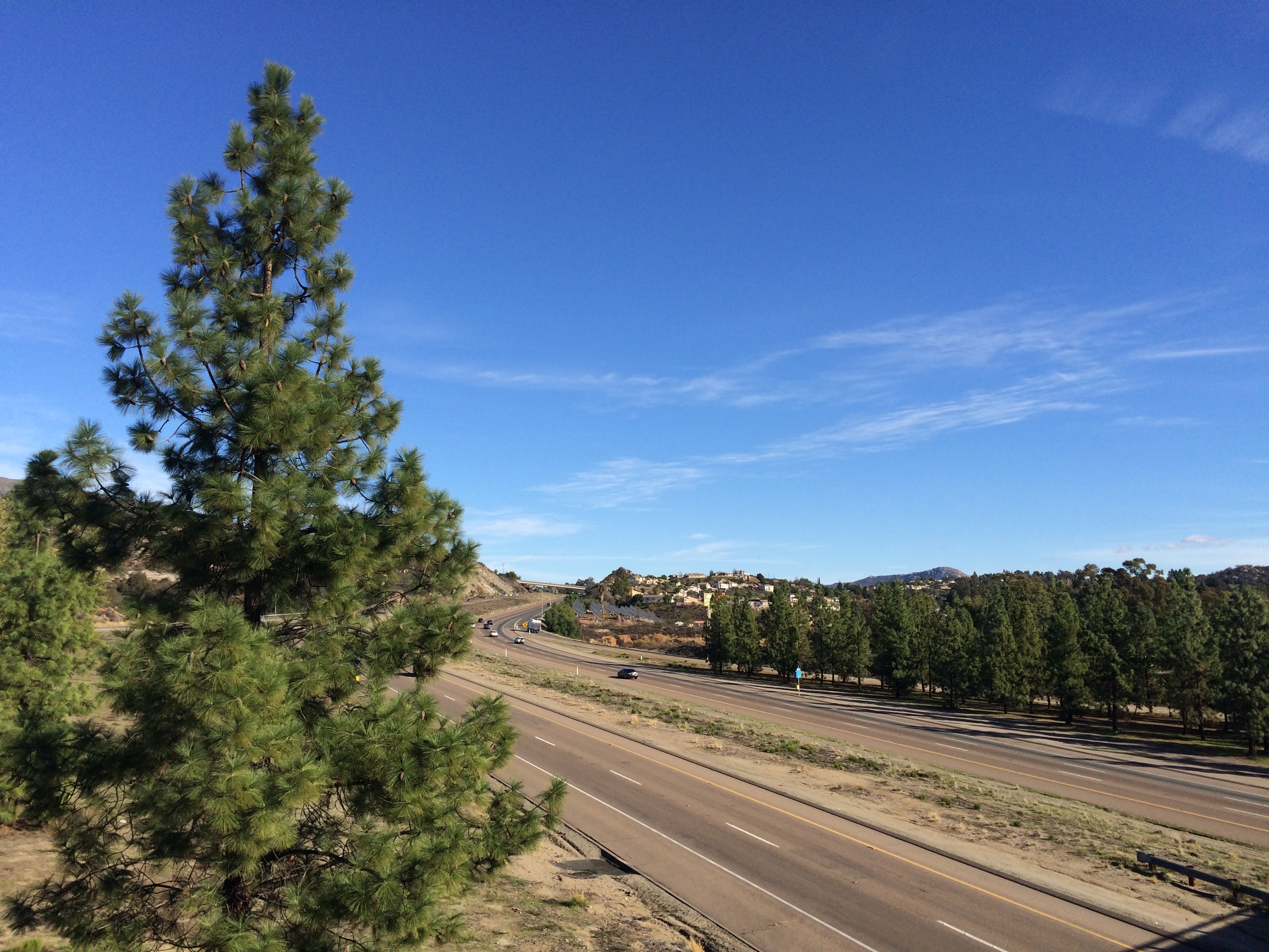 I-8 in Alpine.